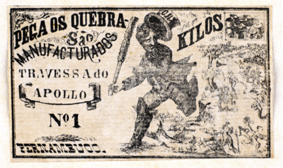 "Pega os Quebra-Kilos", marca de cigarros, Recife (Pernambuco, Brasil), 1875.